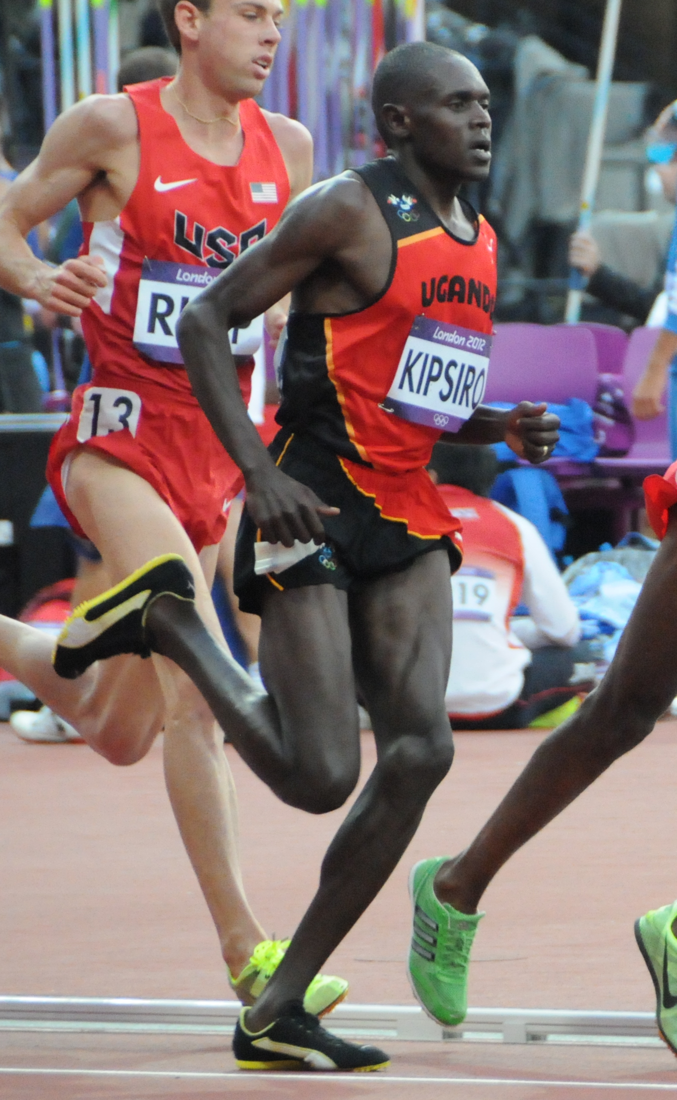 Course du 5000m des jeux olympique de Londres